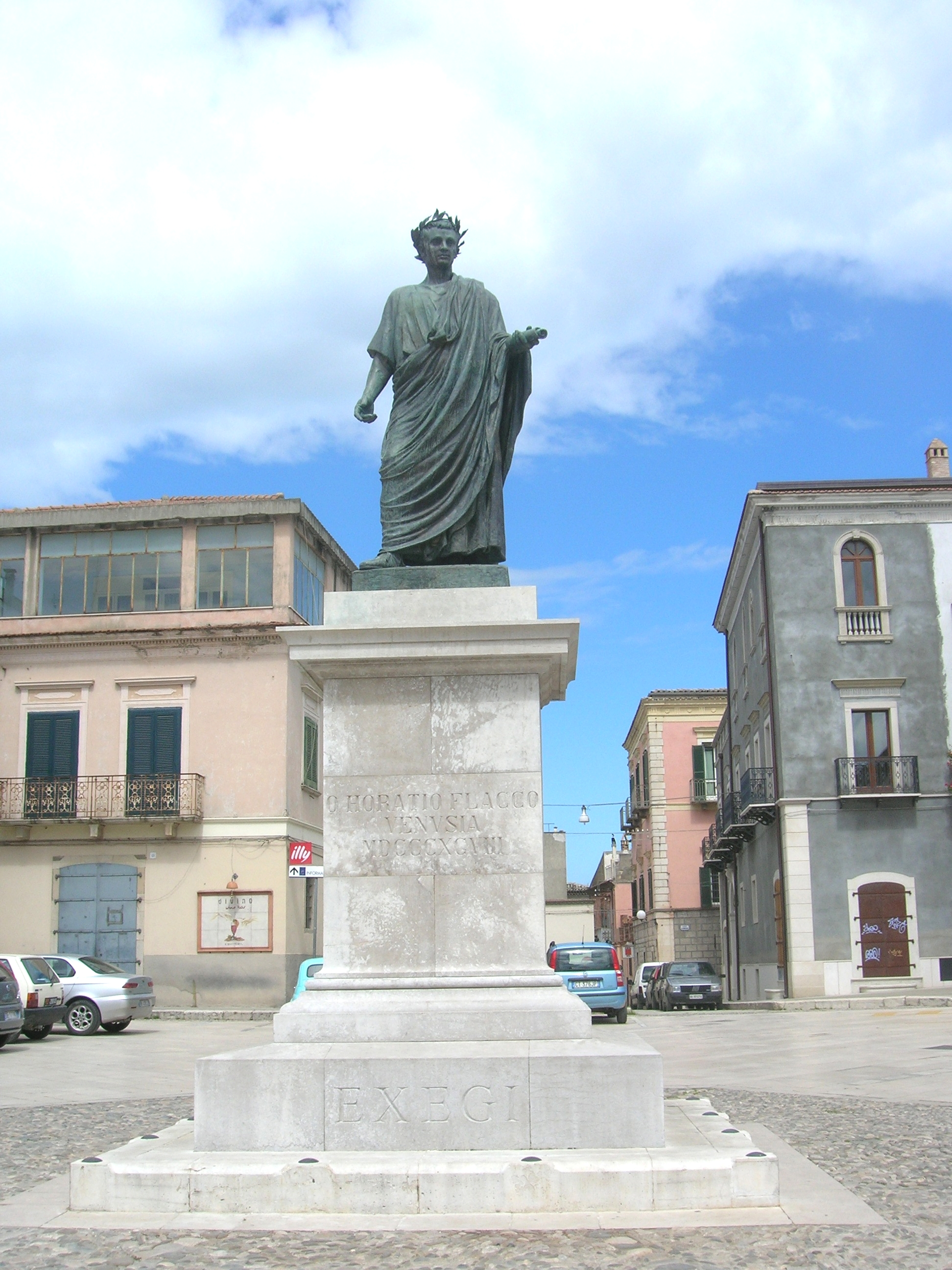 Statua di Quintus Horatius Flaccus (Orazio Flacco), Venosa (PZ)